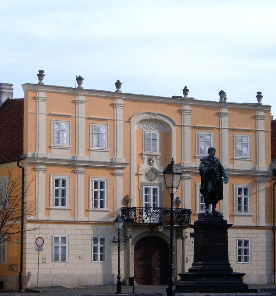 A győri Ott-ház előtérben a Kisfaludy-szoborral, utóbbi Mátrai Lajos György alkotása (Győr-Moson-Sopron megye)